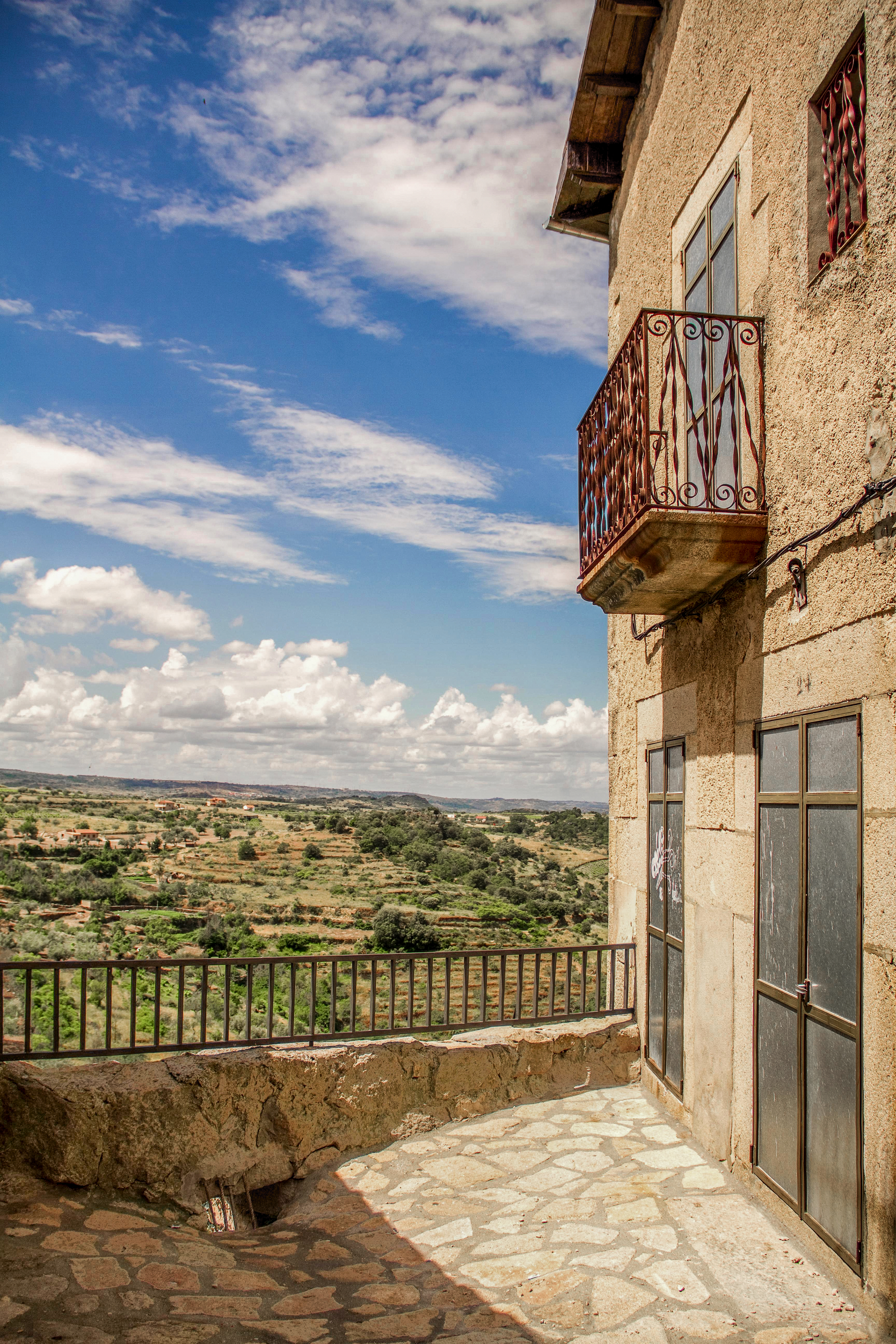 Mirador de la Calle del Terraplén en Fermoselle, Parque Natural de Arribes del Duero, España.